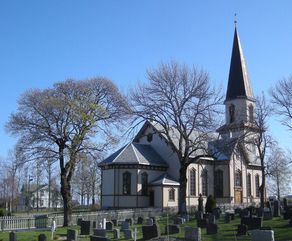 Fet kirke, Akershus, med prestegården i bakgrunnen